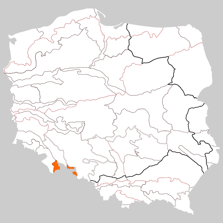 Physico-geographical regionalization of Poland Macroregion 332.6 Eastern Sudetes Regionalizacja fizycznogeograficzna Polski Makroregion 332.6 Sudety Wschodnie